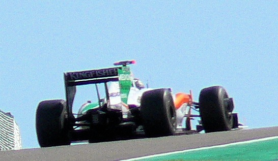 Fisichella driving up Eau Rouge